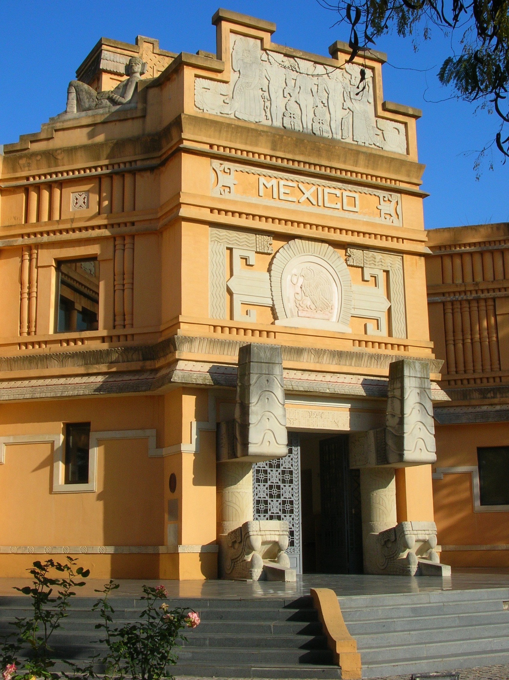 Pabellón de México de la Exposición de Sevilla de 1929, actual Vice-rectorado de Posgrados y Doctorados de la Universidad Hispalense)